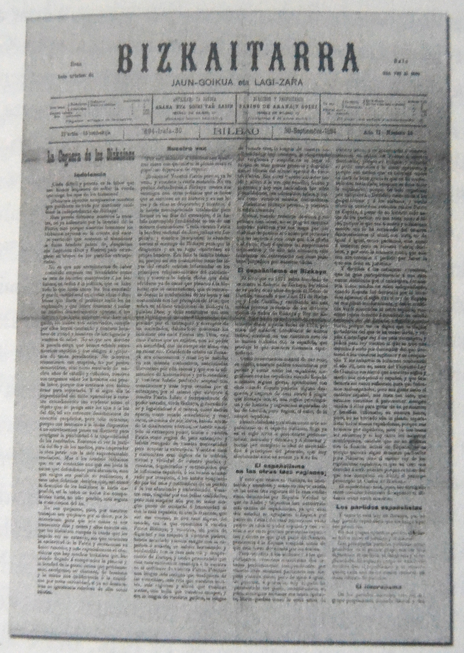 1894ko iraileko Bizkaitarra euskal aldizkari abertzalearen alea. - Bizkaitarra basque nationalism magazine. Number of September, 1894.